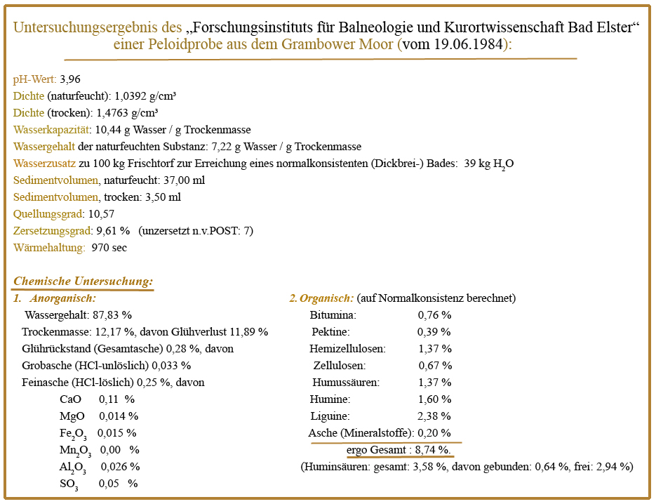 Peloidprobe aus dem Grambower Moor